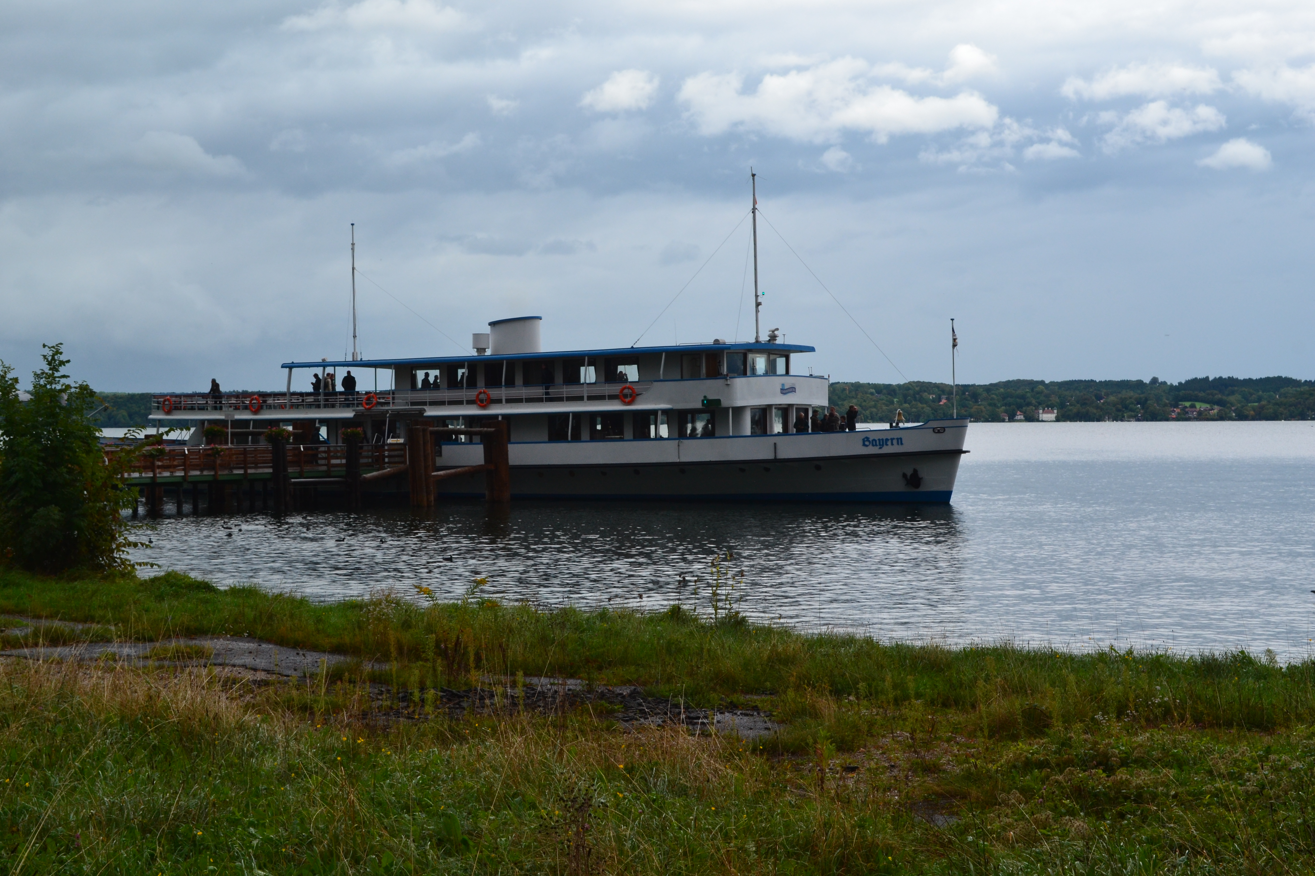 A Bayern nevű hajó a Stanberger See-n